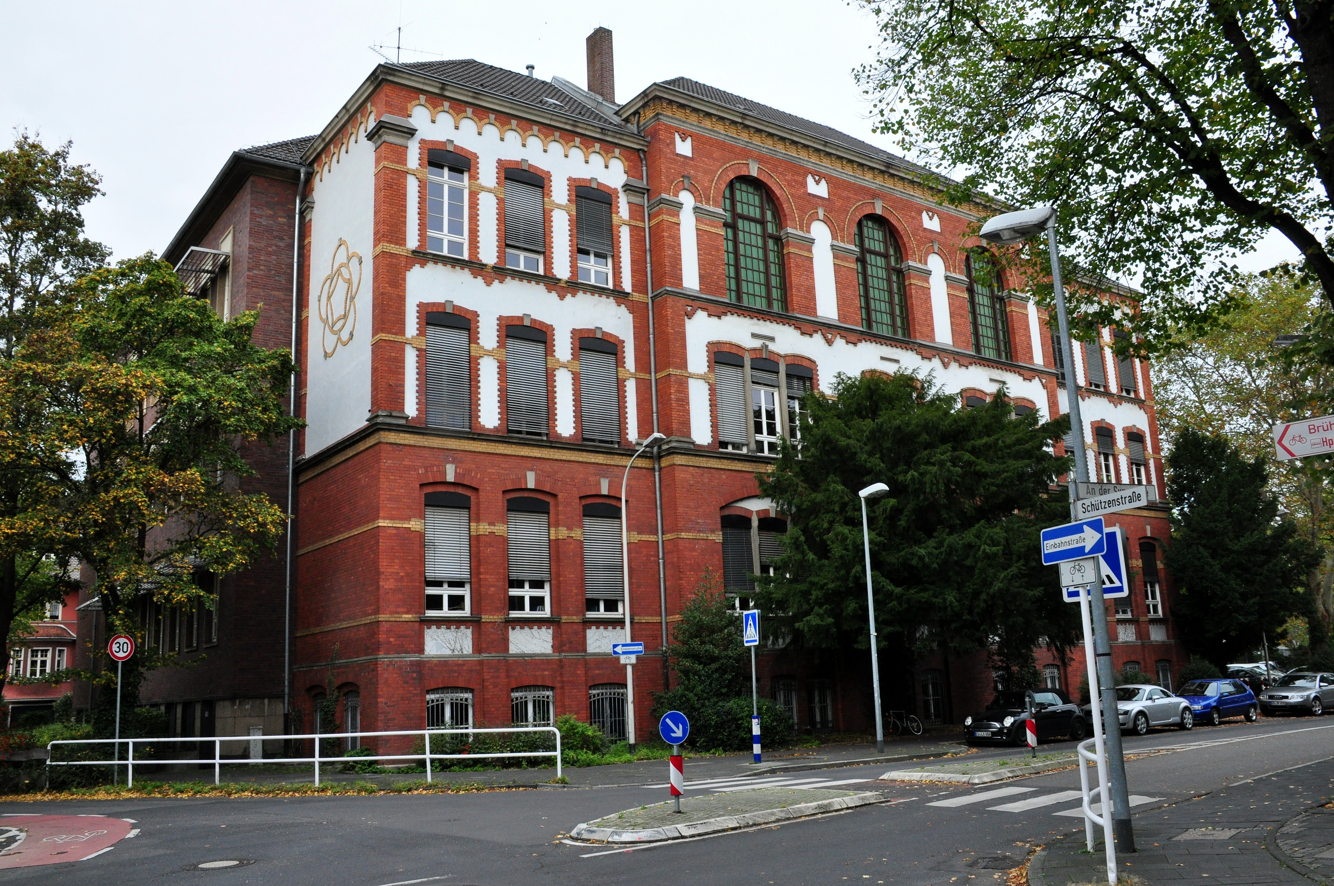 St.-Franziskus-Schule Brühl im Gebäude des ehemaligen Städtischen Gymnasiums: Ansicht von der Schützenstraße